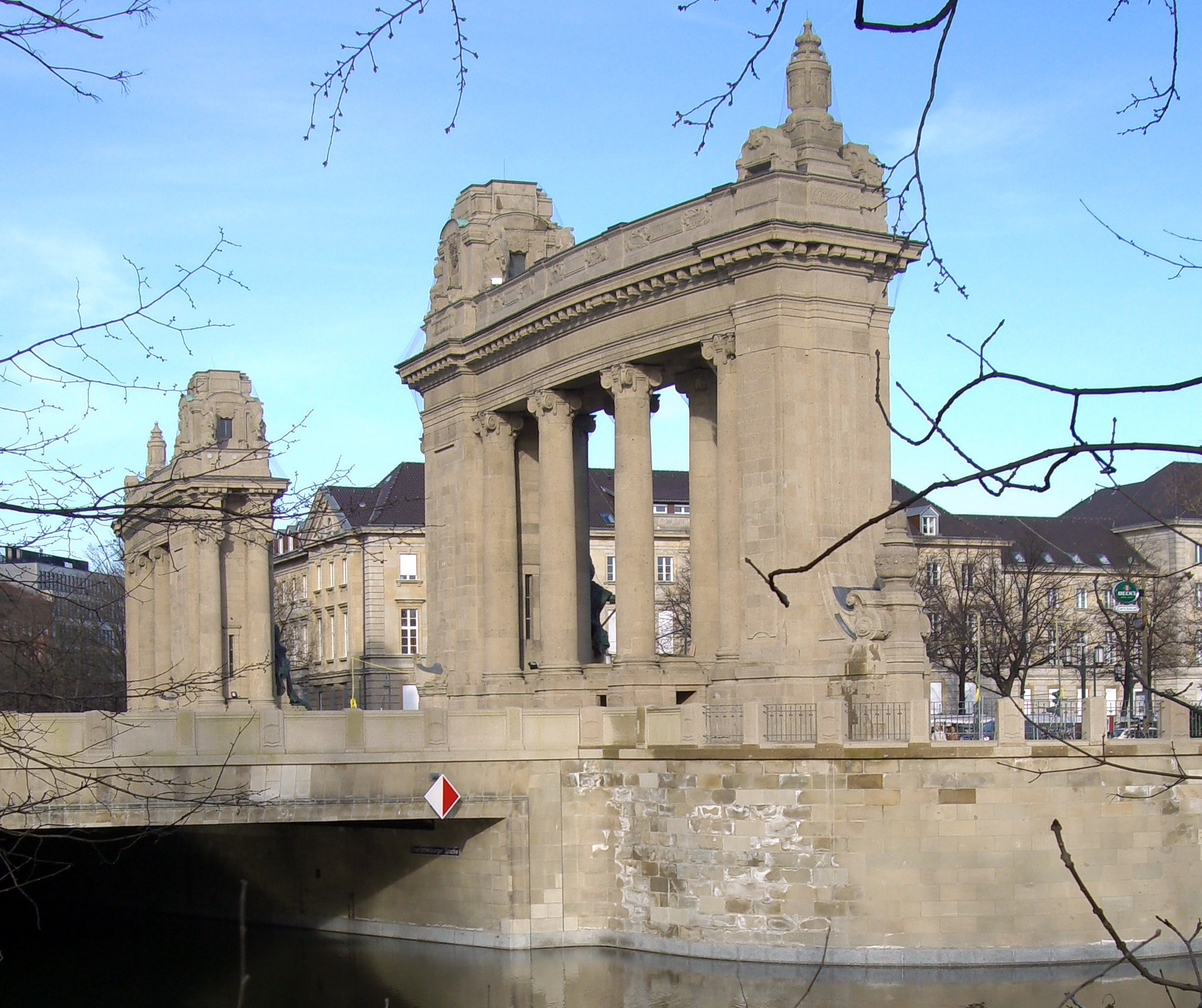 Das Foto zeigt das Charlottenburger Tor am östlichen Ende der Straße des 17. Juni in Berlin.